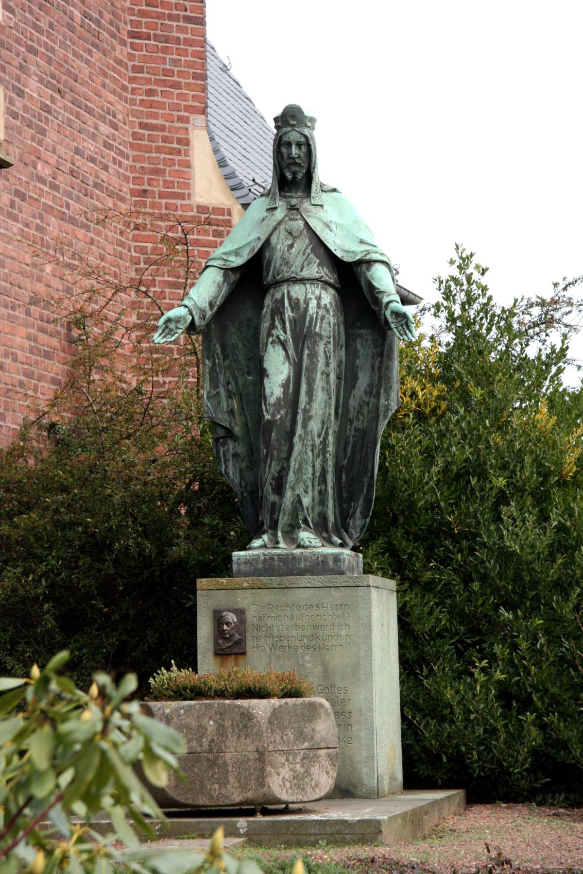 Das Christkönig-Denkmal an der Südseite der Kirche St. Peter und Paul in Würselen-Bardenberg. Es wurde vom Bardenberger Bildhauer Heinrich Derichs als letzte Ruhestätte für den am 12.8.1942 verstorbenen Pfarrer Franz Josef Hesseler gen. Carl (12.9.1863 - 12.8.1942) geschaffen. Franz Josef Carl Hesseler war in der Zeit von 1906 - 1942 Pfarrer in Bardenberg.